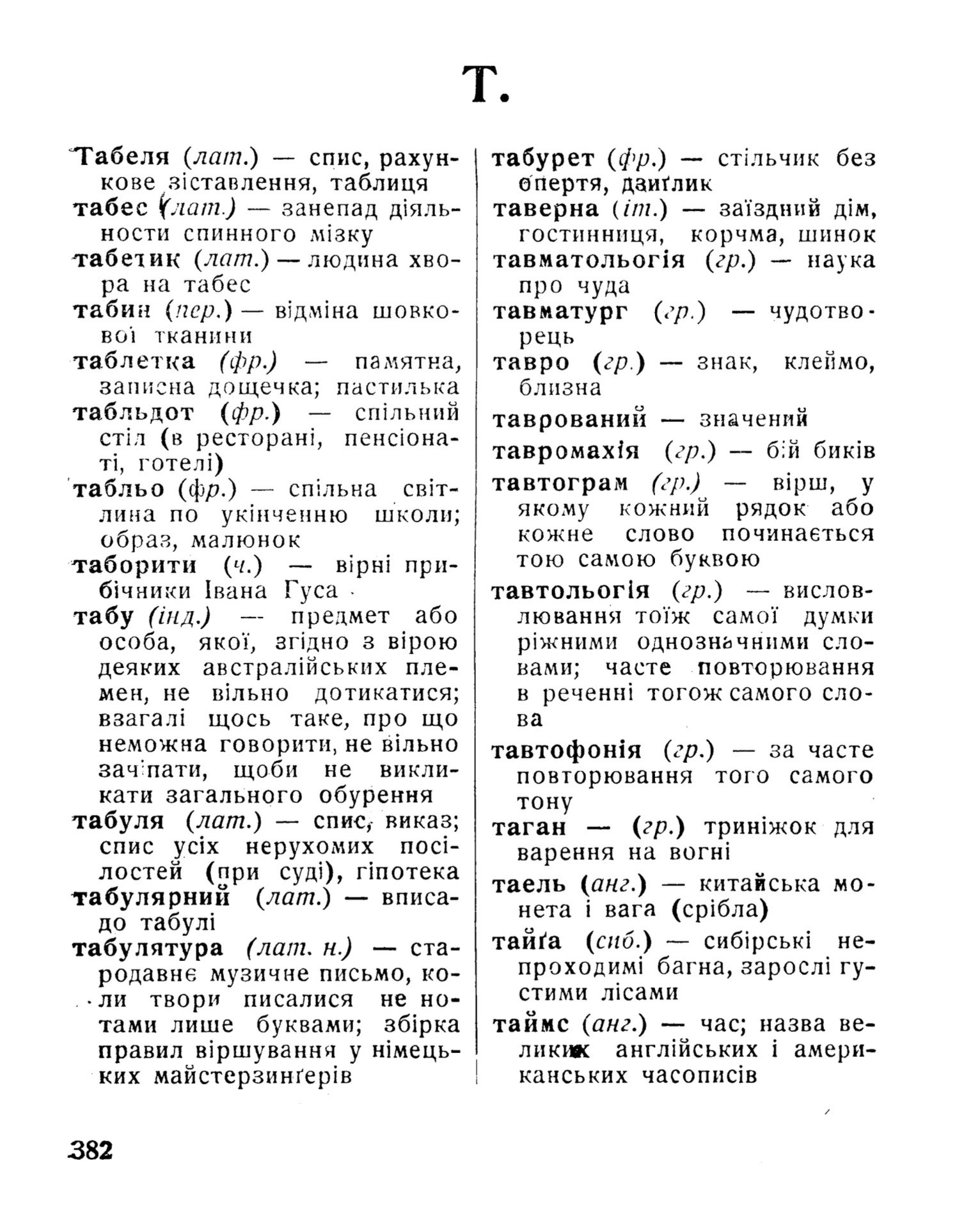 Перша сторінка переліку слів на «Т» зі «Словника чужомовних слів...» Олекси Скалозуба